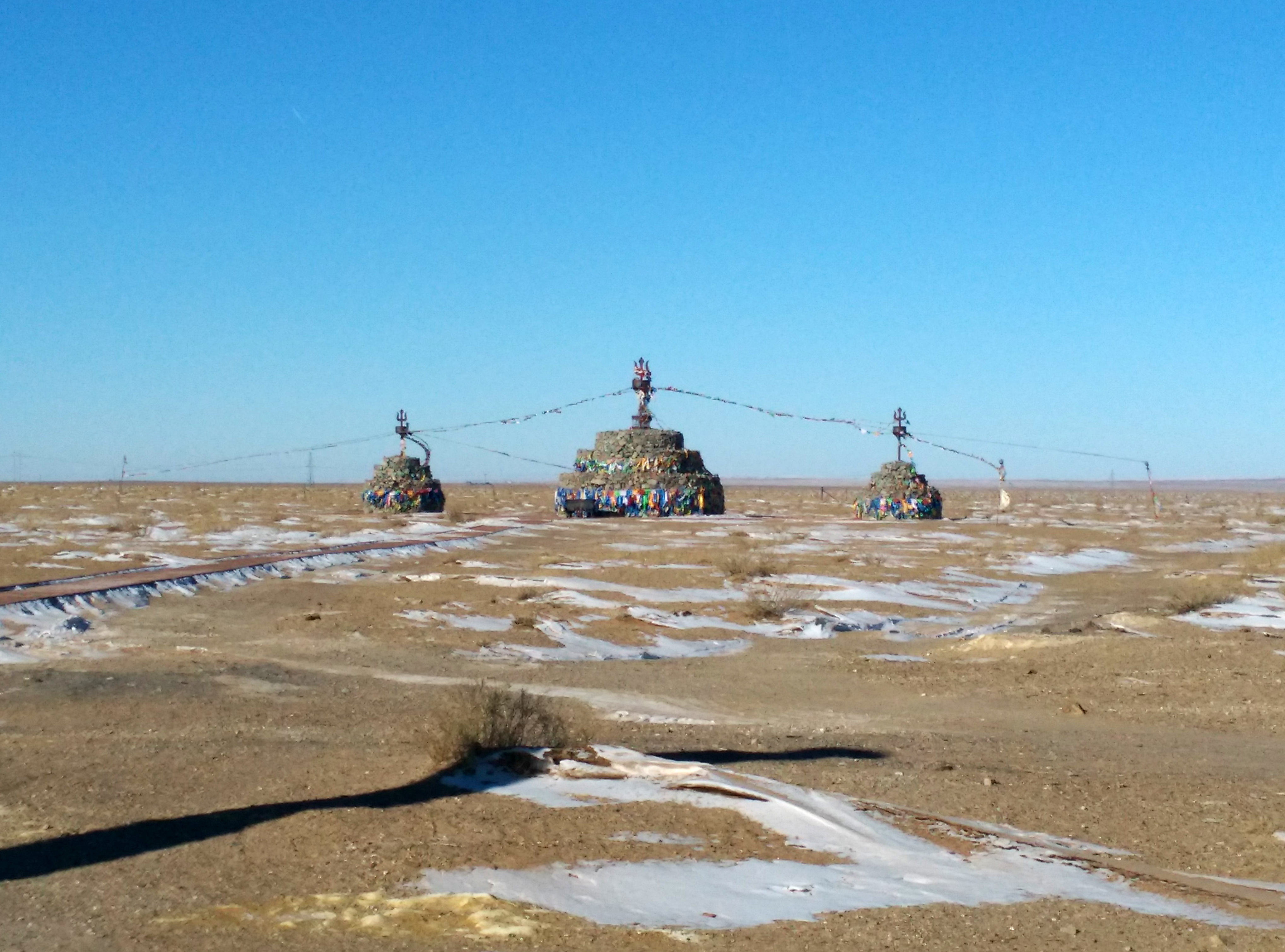 二连敖包。